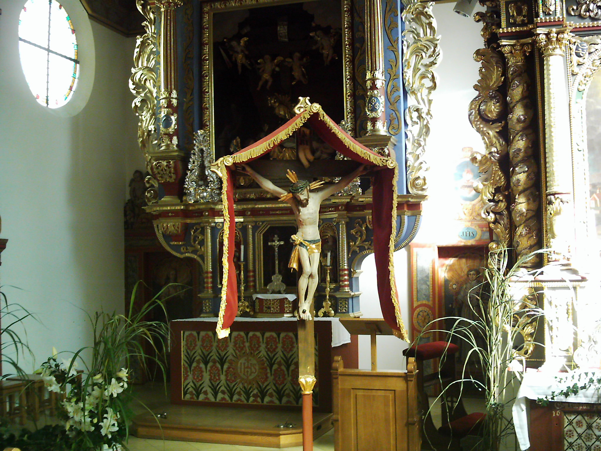 Kath. Filialkirche St. Josef, Illerbachen, Gemeinde Berkheim, Landkreis Biberach.